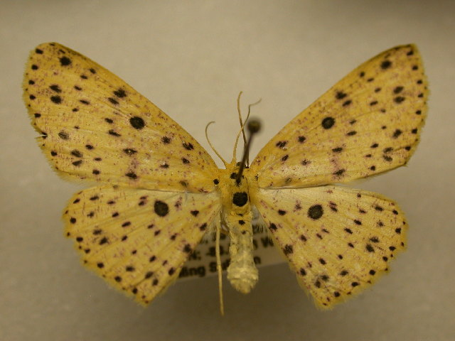 Cyclophora prunelliaria